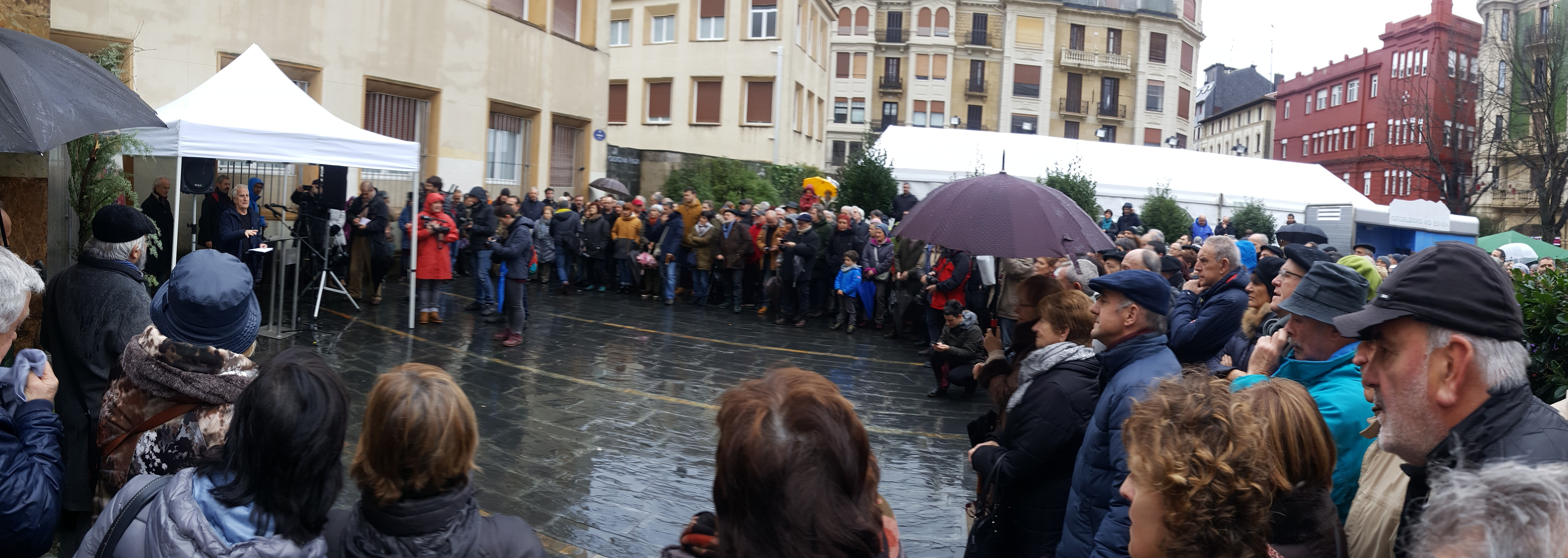 Ibon Sarasola hizketan Txillardegiren muralaren inagurazioan Donostiako Gaskuña plazan